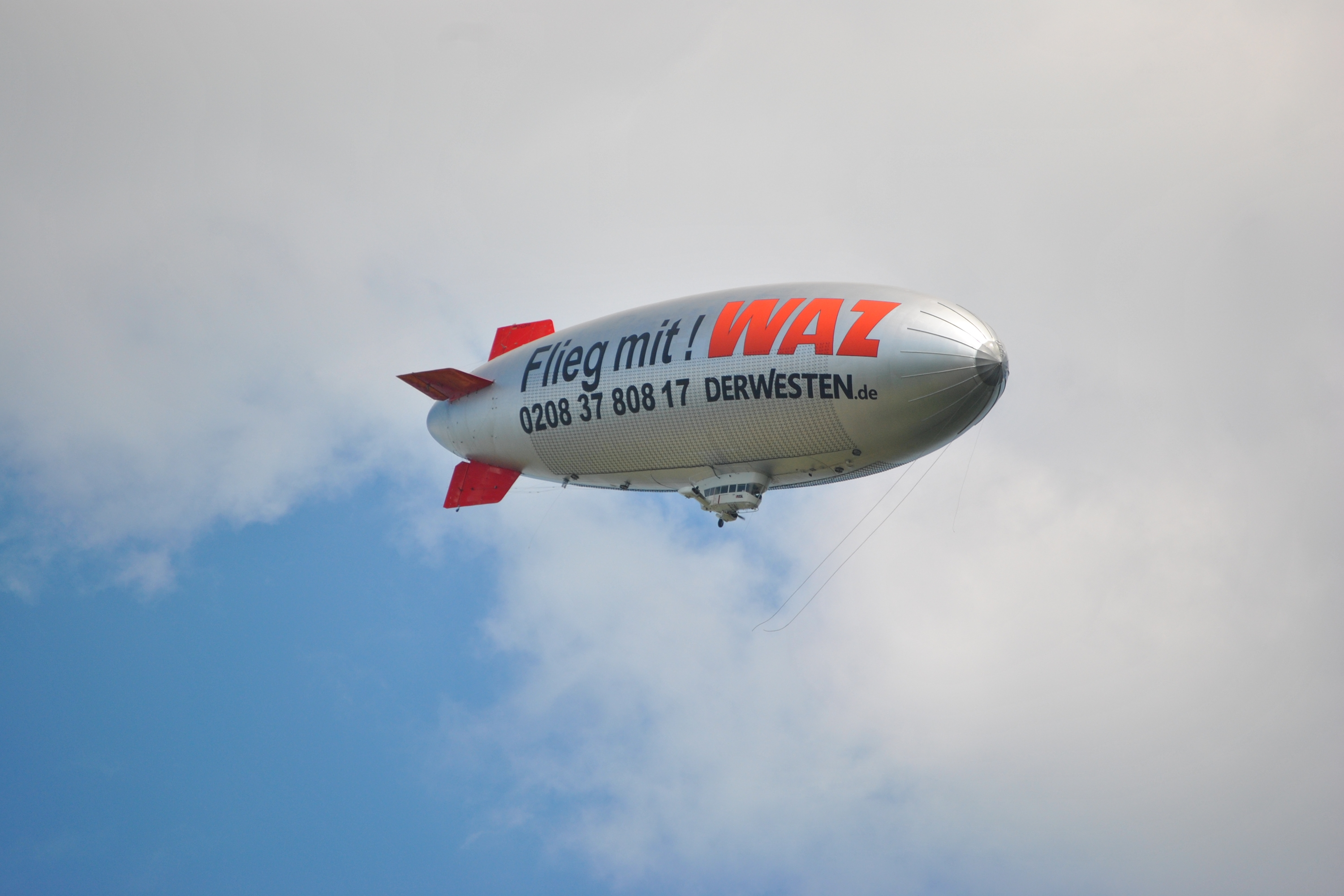 Das WDL-Luftschiff D-LDFR bei einer Werbetour für die WAZ über Moers